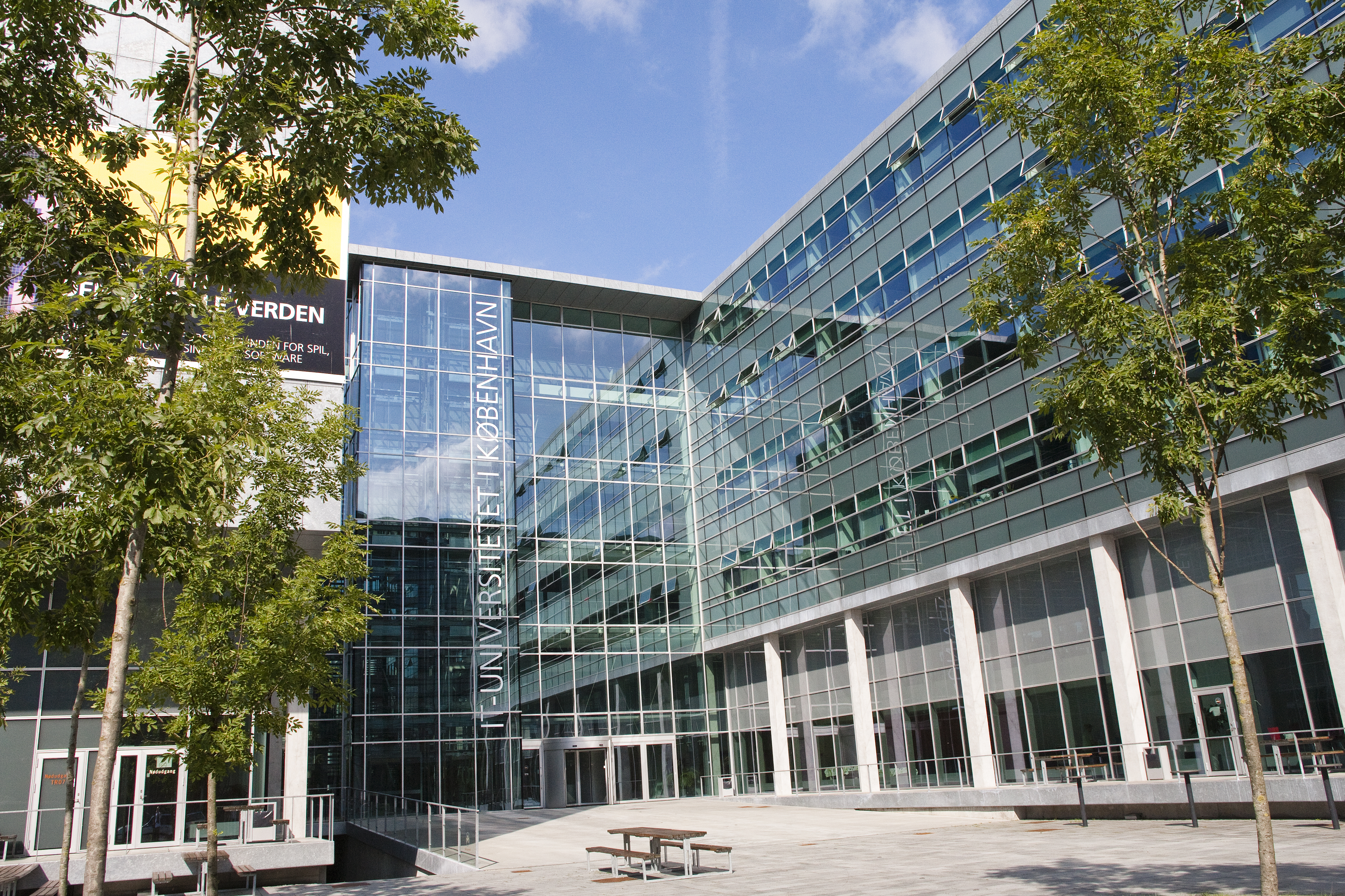 IT-Universitetet København, Orestad - 2010-08-10. Foto: News Øresund – Jenny Andersson. © News Øresund. Bilden får fritt publiceras under förutsättning att källa anges. (The picture can be used freely under the prerequisite that the source is given. ) Architecture, Research. Originalfil tillhandahålles gratis, kontakta: News Øresund, Malmö, Sweden. News Øresund är en oberoende regional nyhetsbyrå som ingår i projektet Øresund Media Platform som drivs av Øresundsinstituttet i partnerskap med Lunds universitet och Roskilde Universitet och med delfinansiering från EU (Interreg IV A Öresund) och 14 regionala, icke kommersiella aktörer.